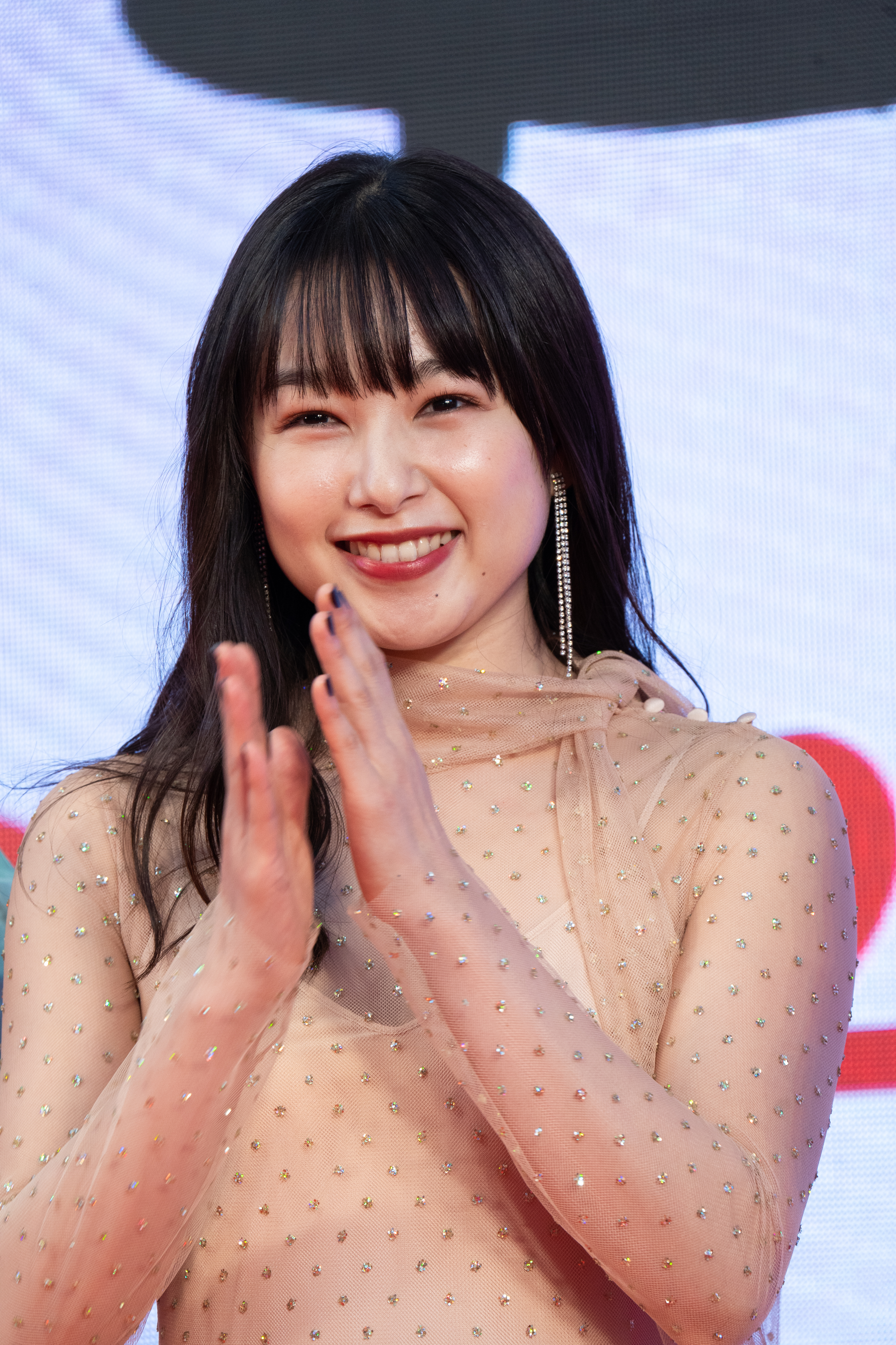 第32回 東京国際映画祭 オープニングセレモニー 桜井日奈子 (殺さない彼と死なない彼女)